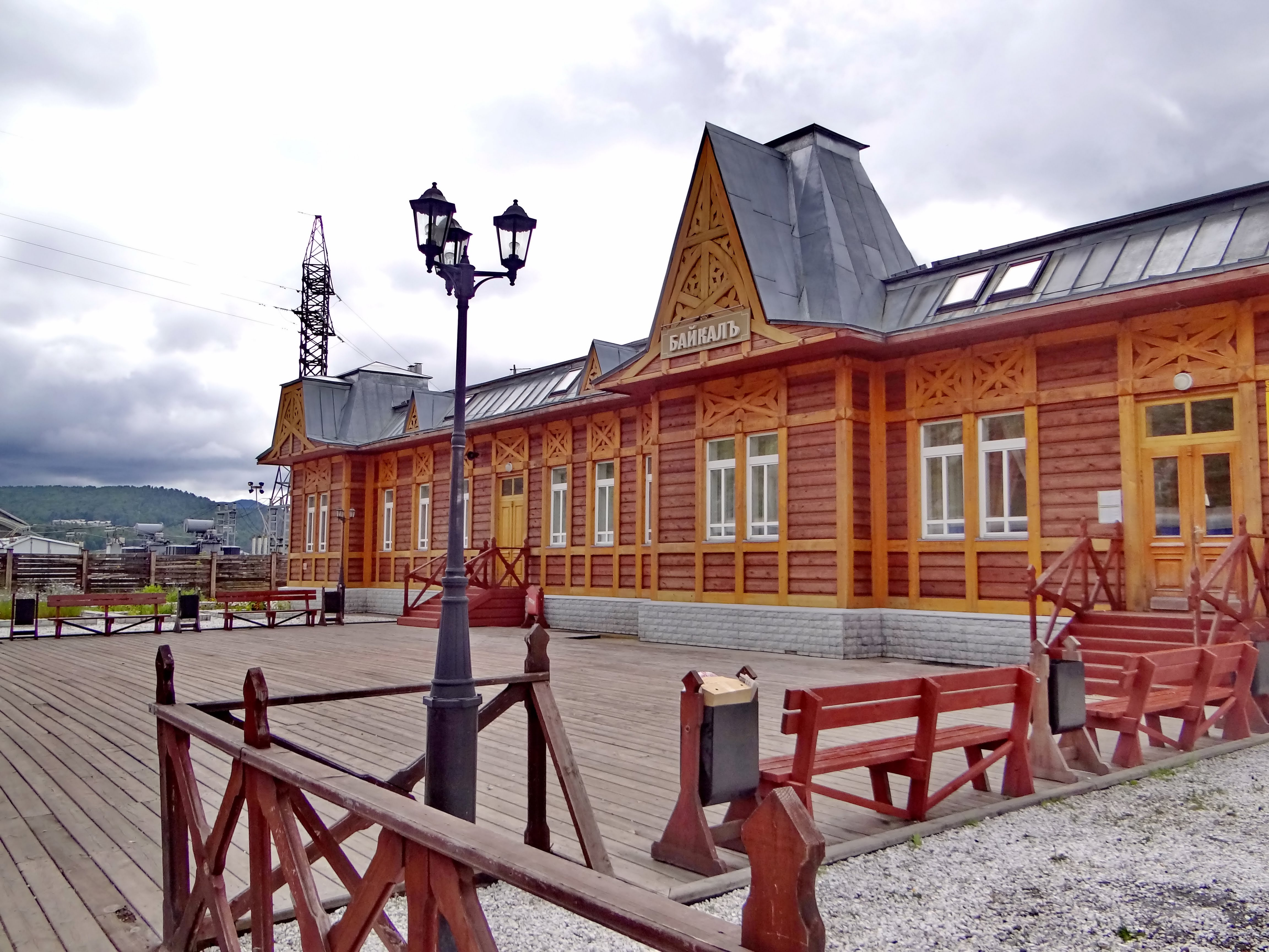 Комплекс Кругобайкальской железной дороги: ж.-ст. Байкал - ж.-ст. Слюдянка (68-167 км), Слюдянский район, Иркутская область